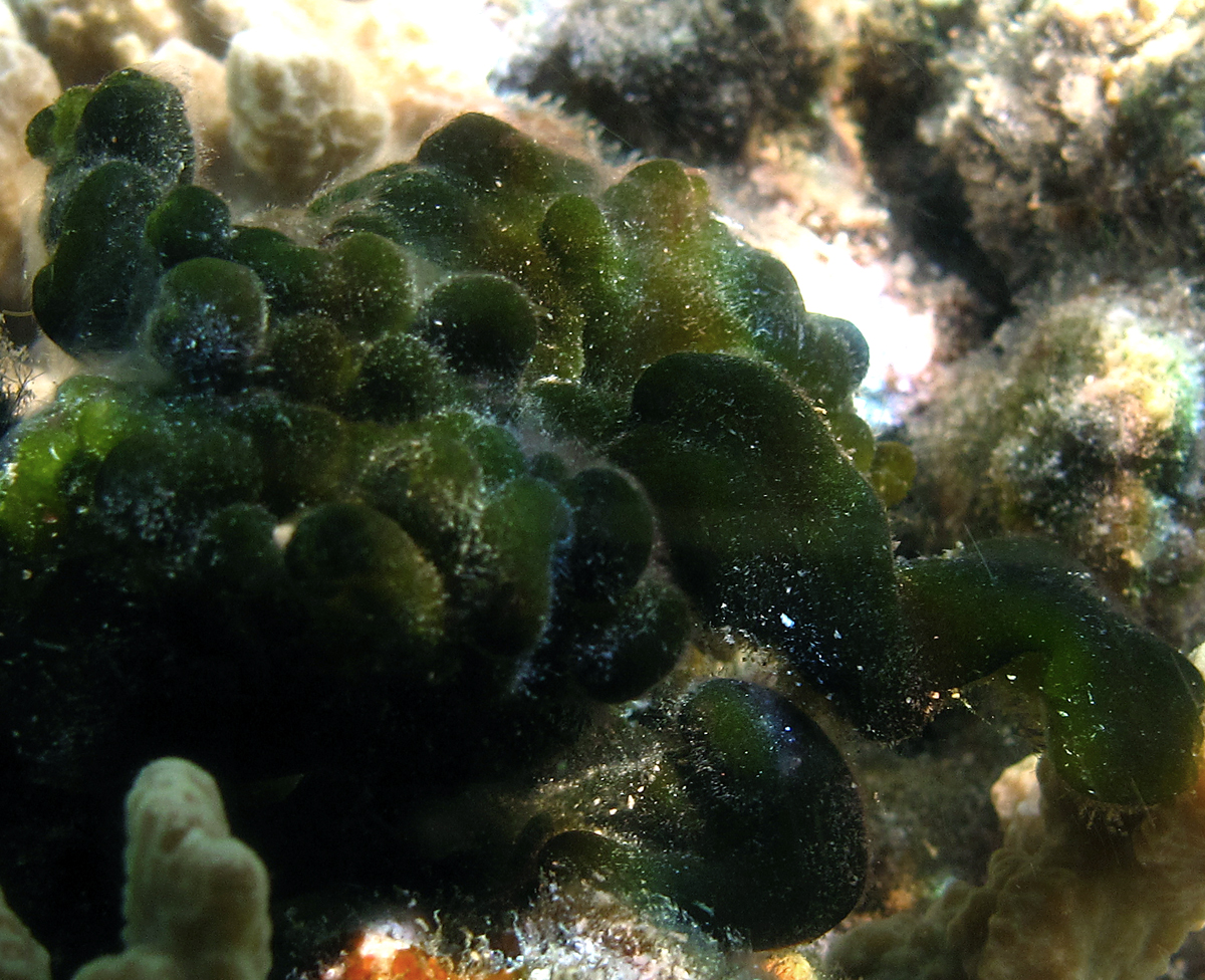 L'algue Codium arabicum à la Réunion.